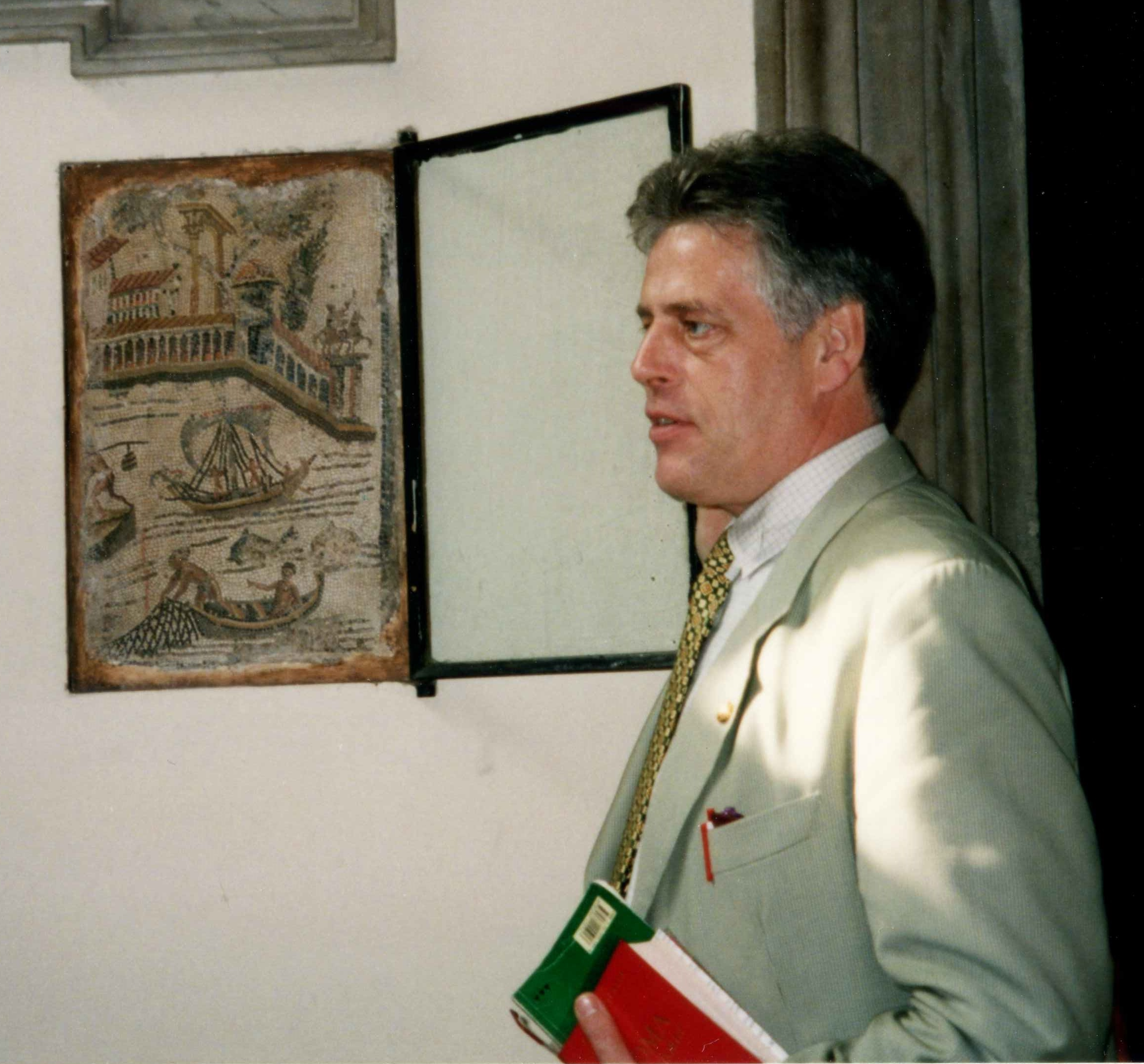 Bernhard Heitmann 1995 in Rom vor einem der augustäischen Mosaiken im Raum vor der Sakristei der Kirche Santa Maria in Travestere